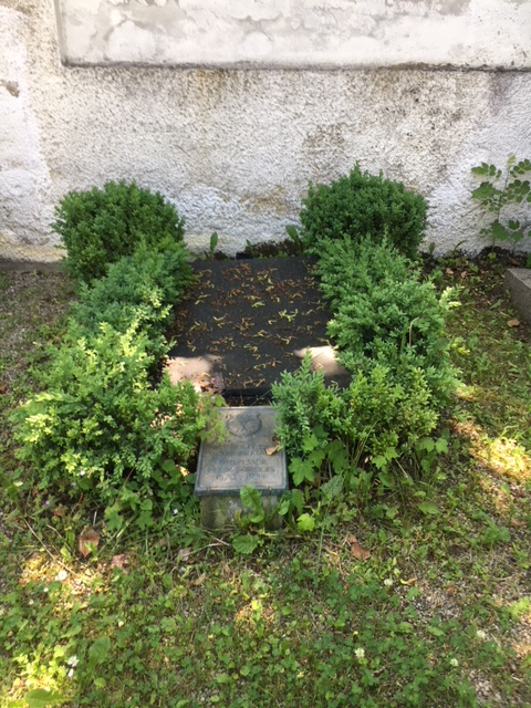 Grabstätte von Felix Bürgers "Alter Friedhof" Dachau